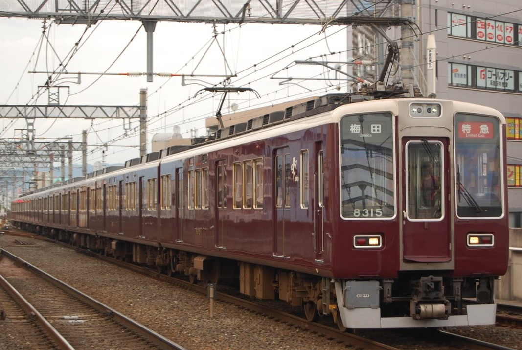 阪急8300系8315F 特急梅田行き 茨木市駅